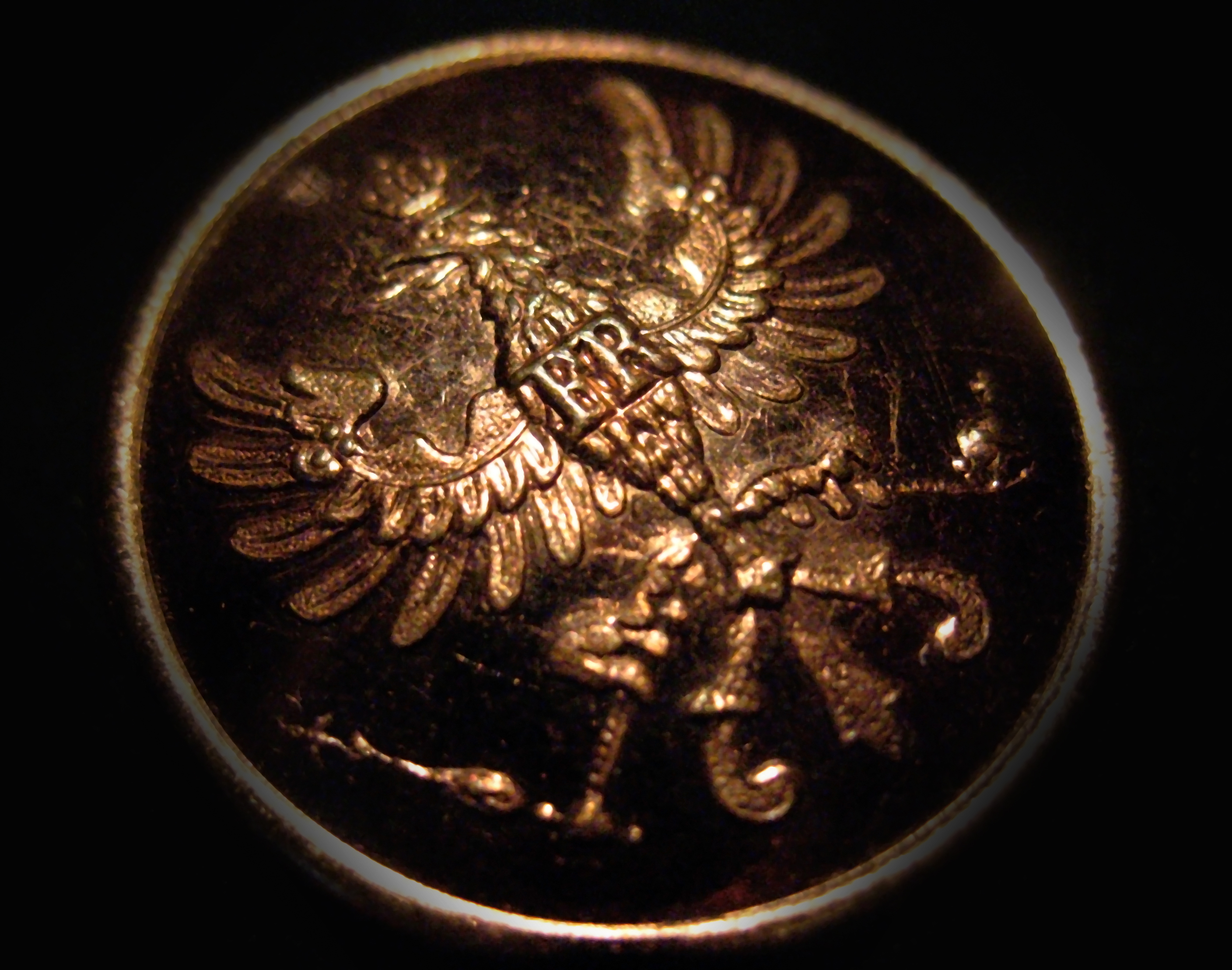 Offiziersknopf_Preussen Kaiserreich